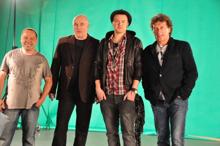 Jaworski, Rynkowski, Łozo, Panasewicz - Backstage projektu Mazury Cud Natury